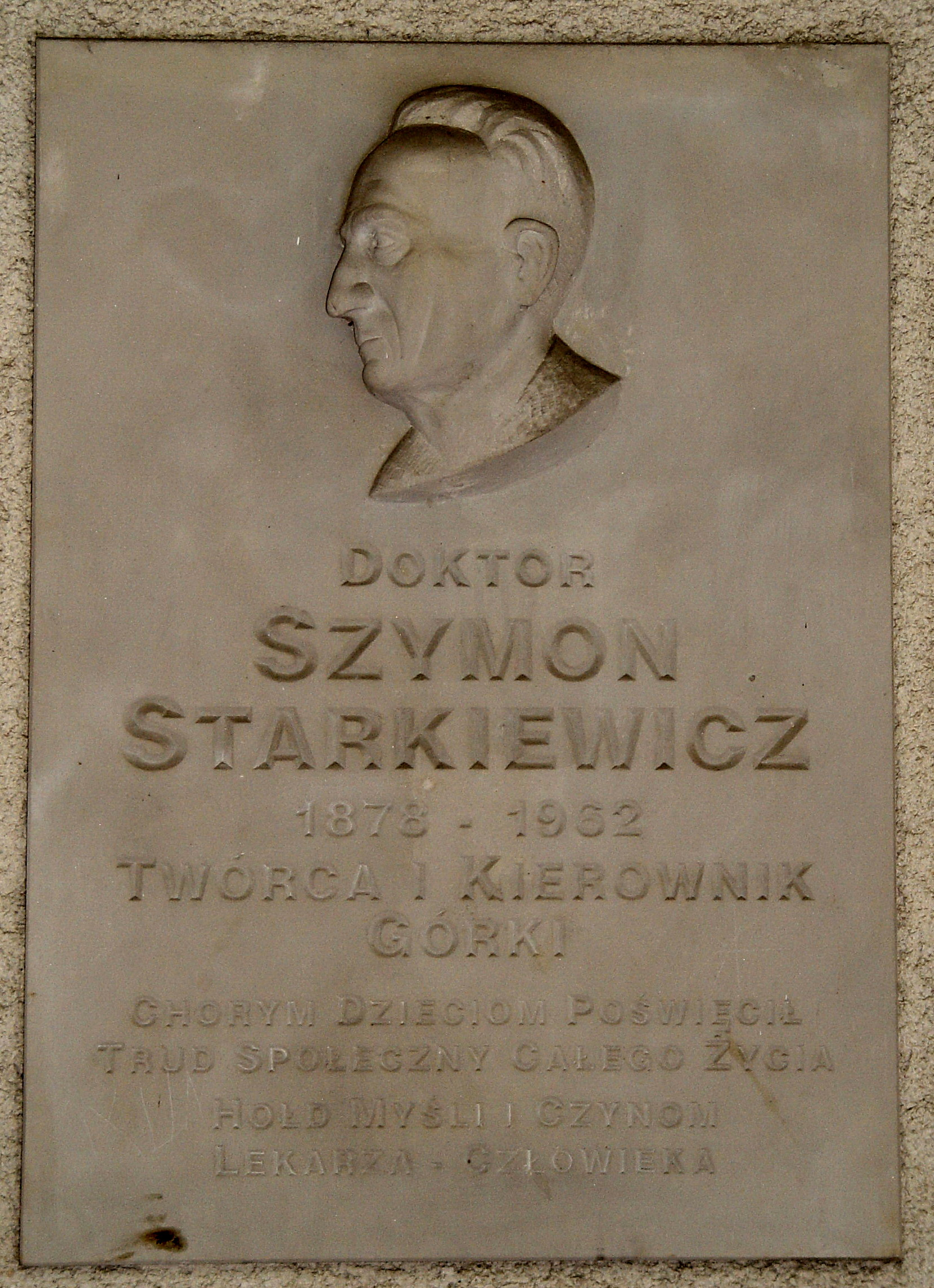 Tablica pamiątkowa dr.Szymona Starkiewicza, założyciela i wieloletniego dyrektora Szpitala "Górka" w Busku-Zdroju wmurowana w budynku "Górki"